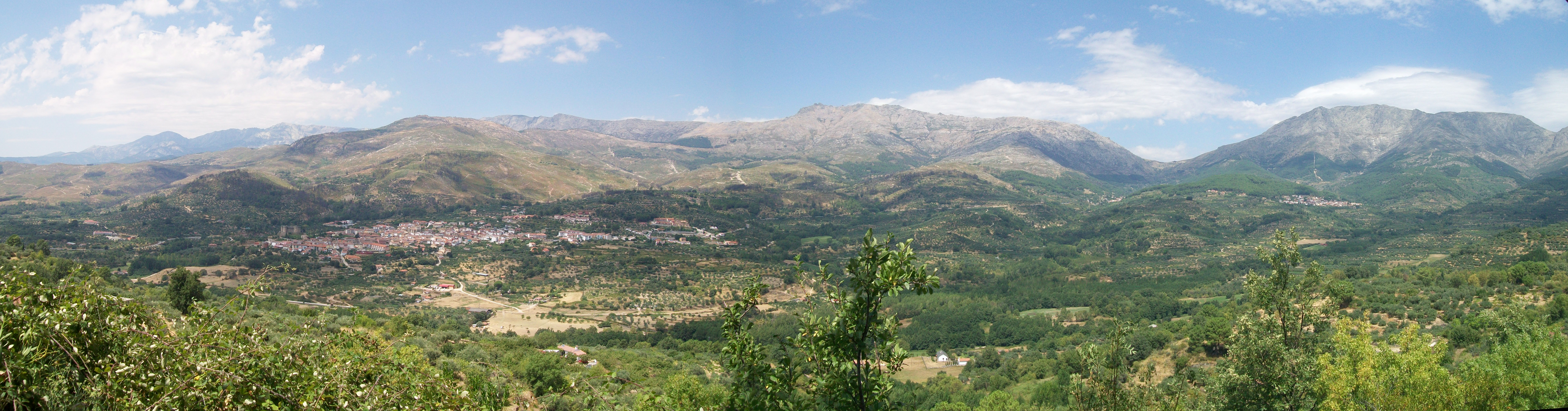 Vista panorámica de Mombeltrán, Ávila (España) tomada desde Santa Cruz del Valle, en agosto de 2011.